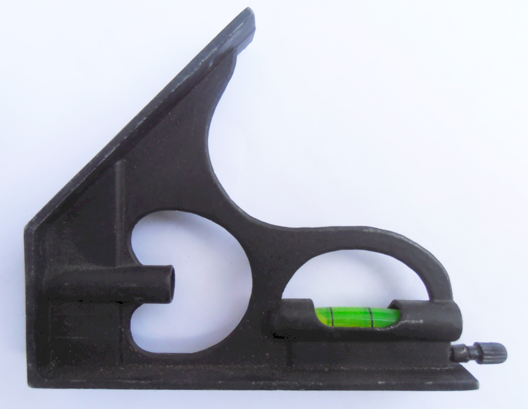 Kleine Wasserwaage für horizontale, vertikale und 45° Messung